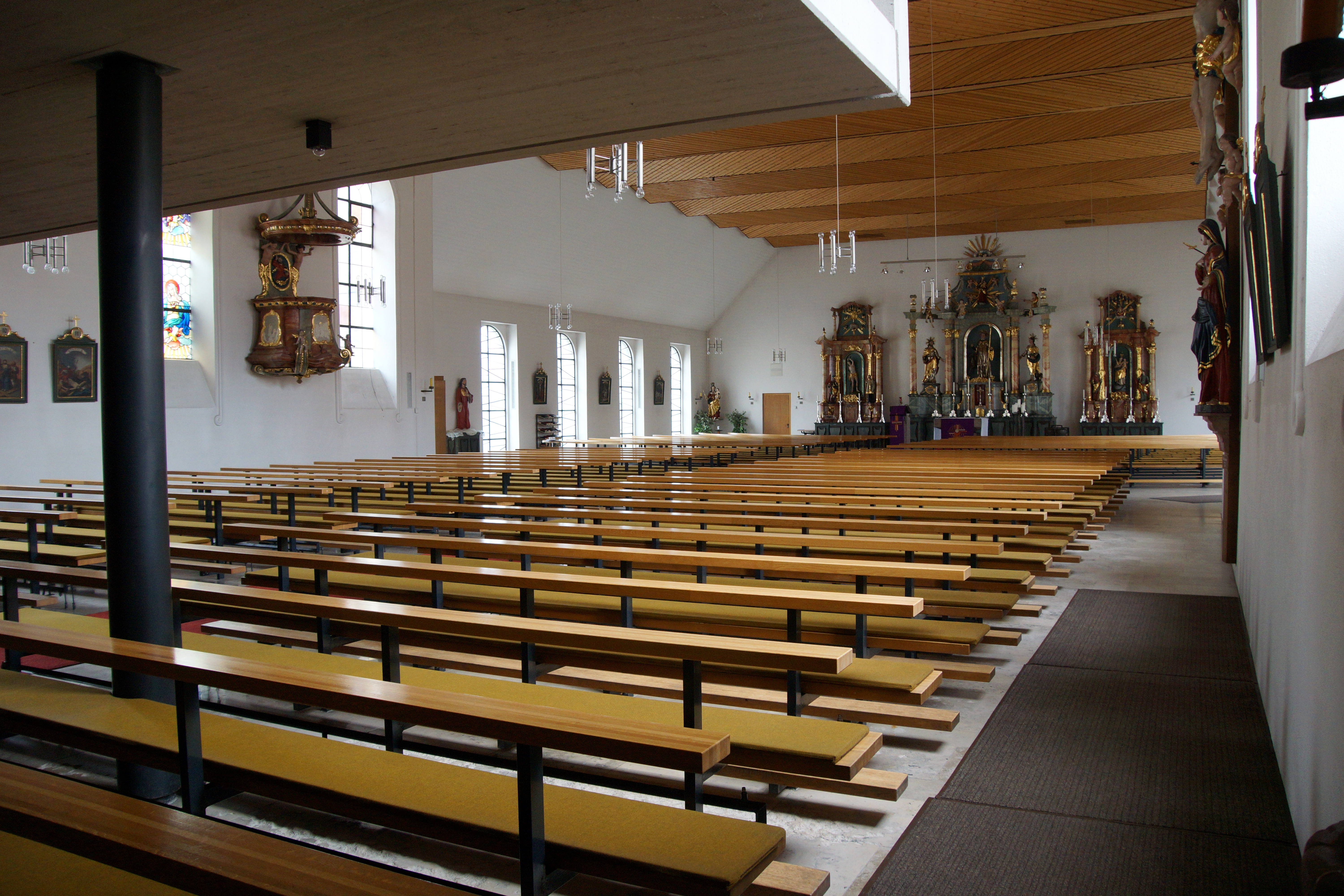 Die katholische Pfarrkirche St. Ägidius in Schmidmühlen in der Oberpfalz